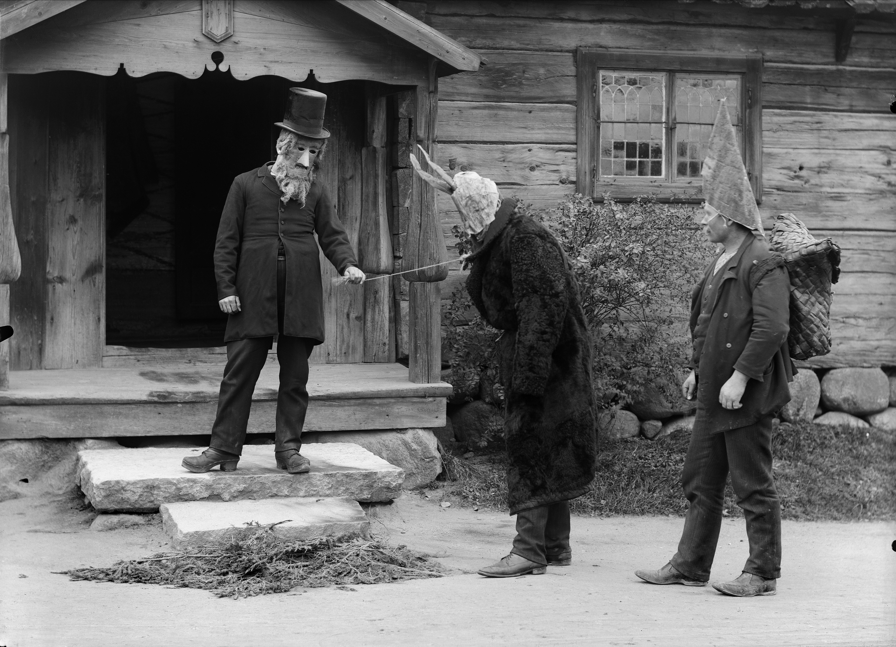 Julbock med sällskap tagen vid Bollnässtugan, Skansen.